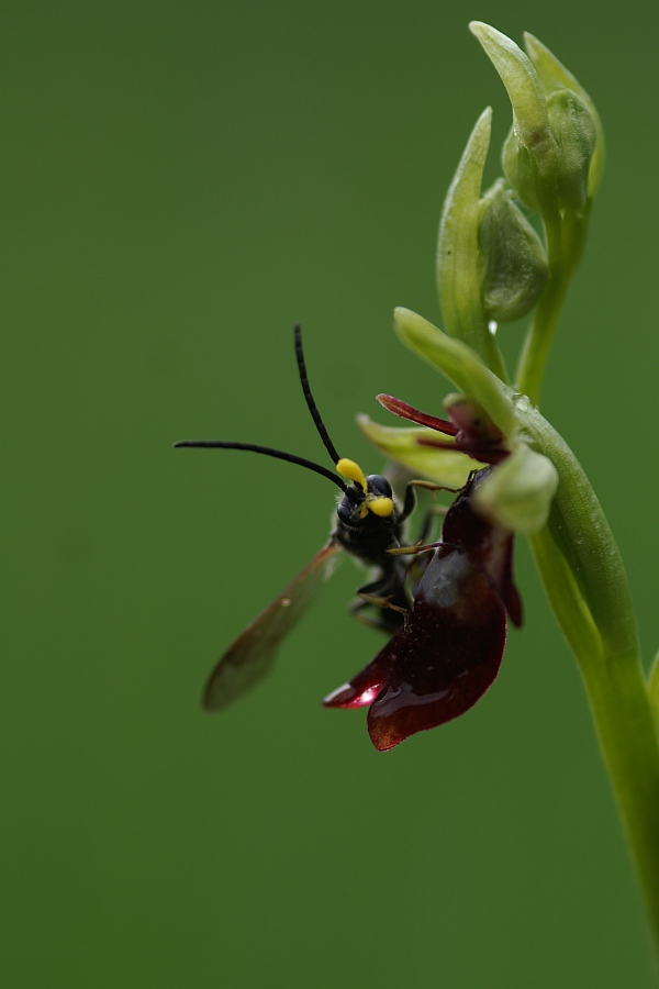 Bestäuber auf Fliegenragwurz